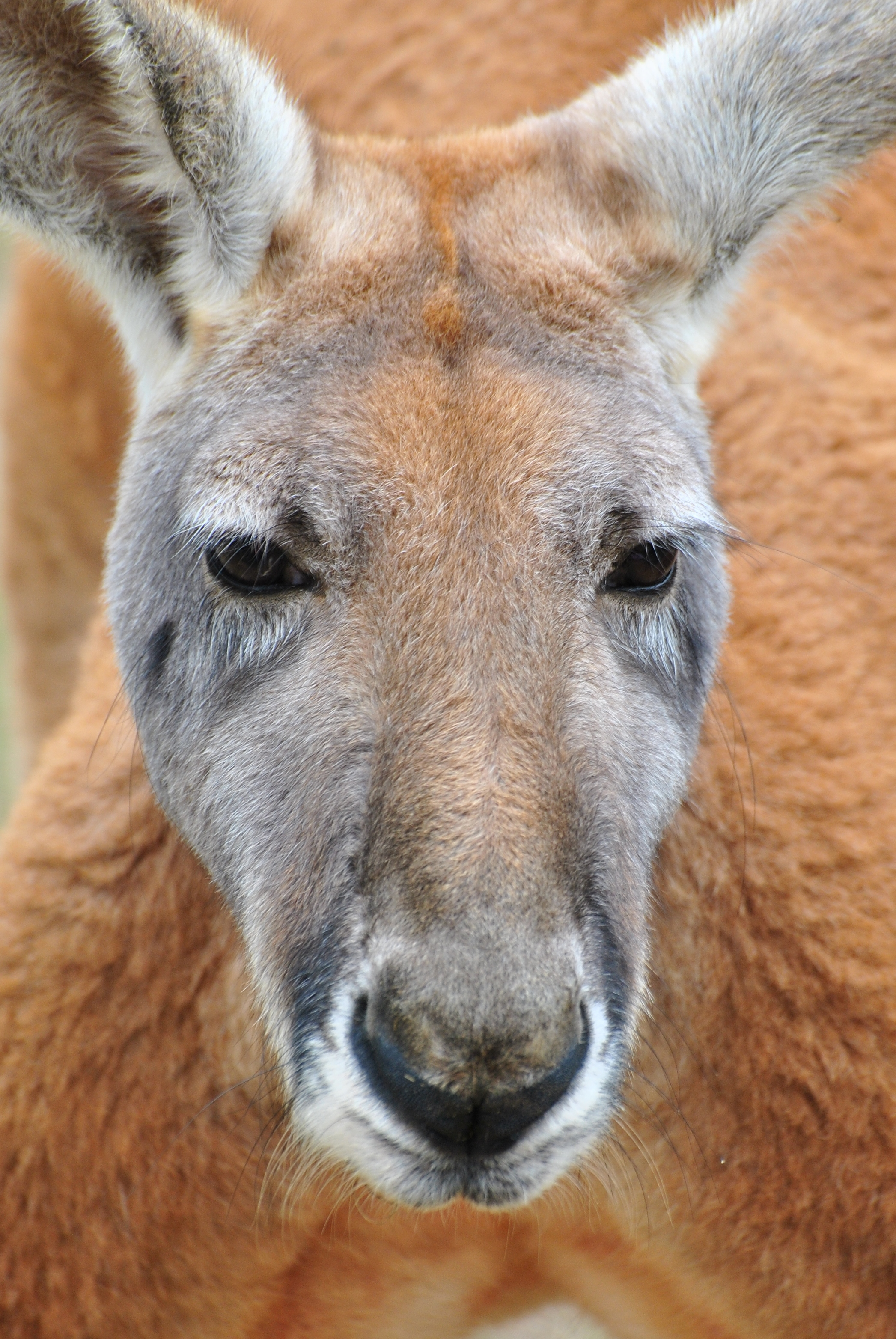 Red Kangaroo